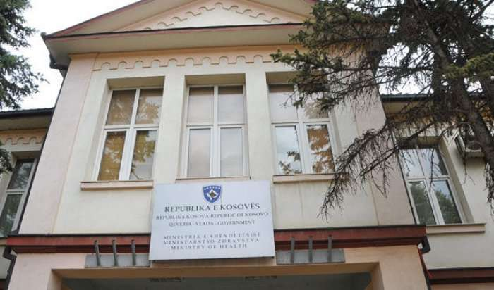 Ministria e Shëndetësisë është një organ qeveritar I cili gjendet ne Prishtinë, Kosovë. Adresa korrekte është /Rr. Zagrebit Nr. 60/ 10000 Prishtinë/ Republika e Kosovës/